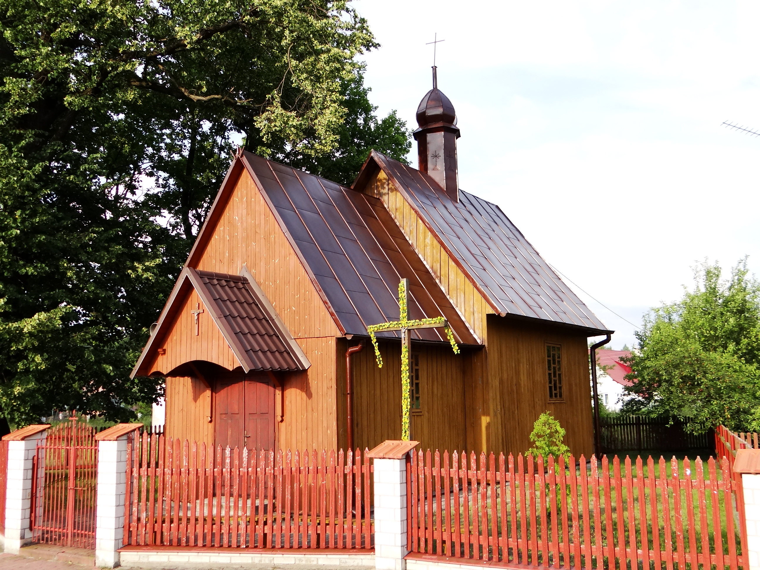 Zdjęcie wykonane w miejscowości Szyperki.